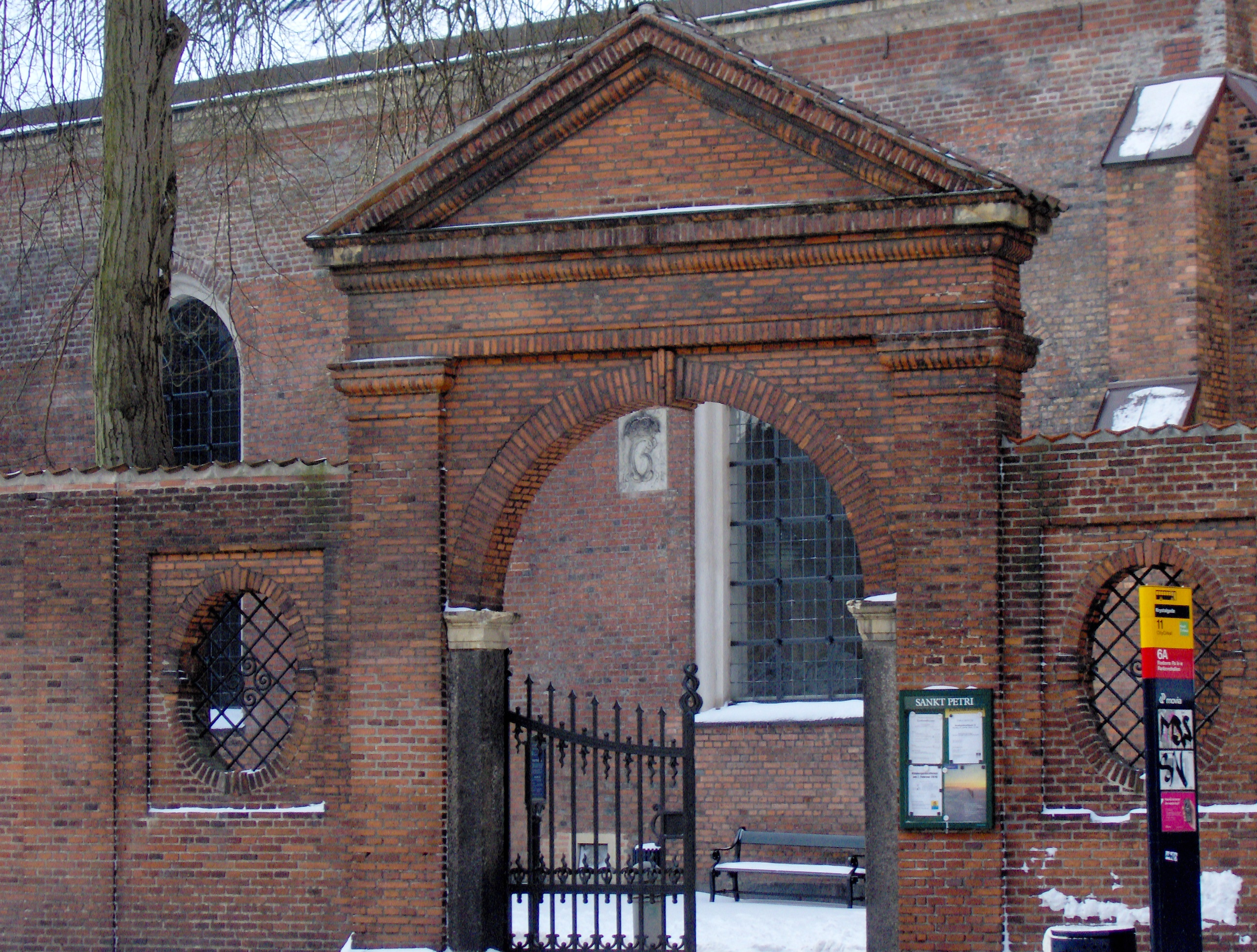 The gate to Sankt Petri Kirke (St. Peter's Church) in Copenhagen, Denmark